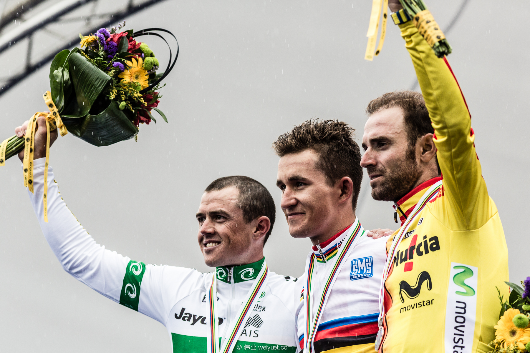 RR Men's Elite